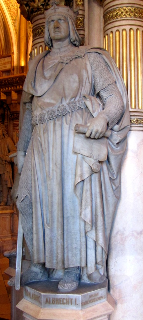 Statue des Königs Albrecht I. in der Feldherrenhalle des Heeresgeschichtlichen Museums in Wien.